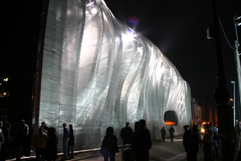 nachtopname / night view